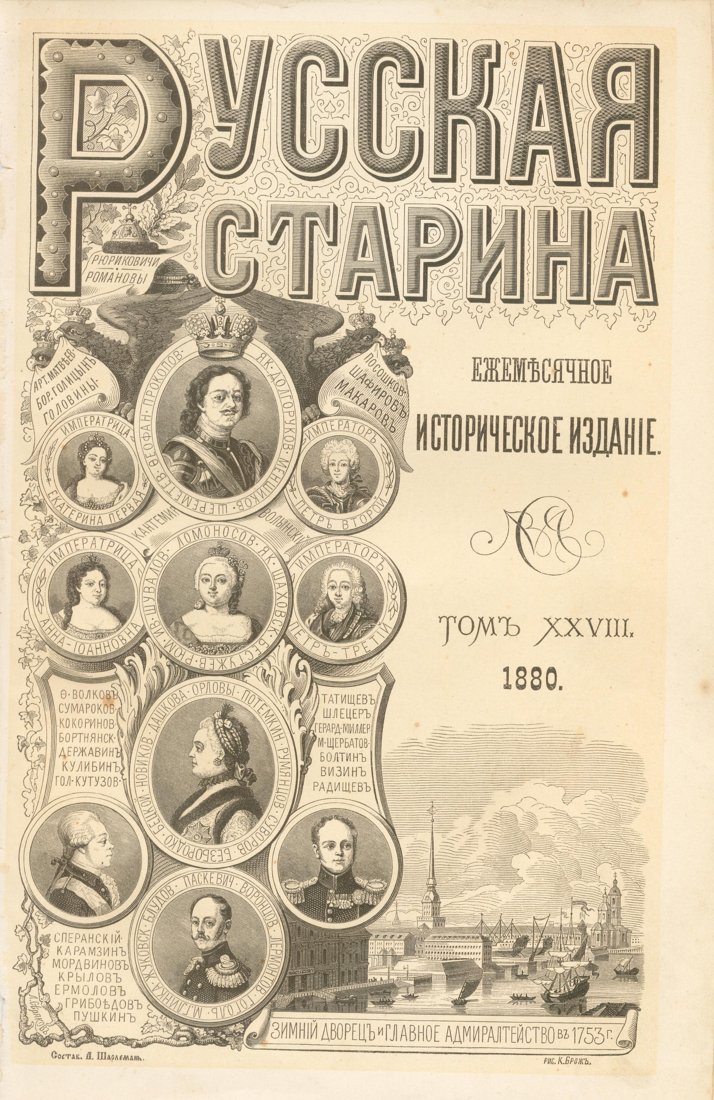 Title page of russian magazine Russkaja Starina. 1880.